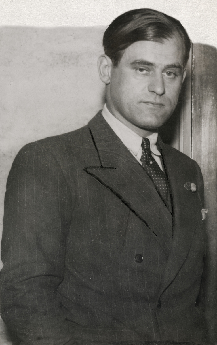 Odd Nansen, ca. 1930–35. Fra Byhistorisk samling hos Oslo Museum.